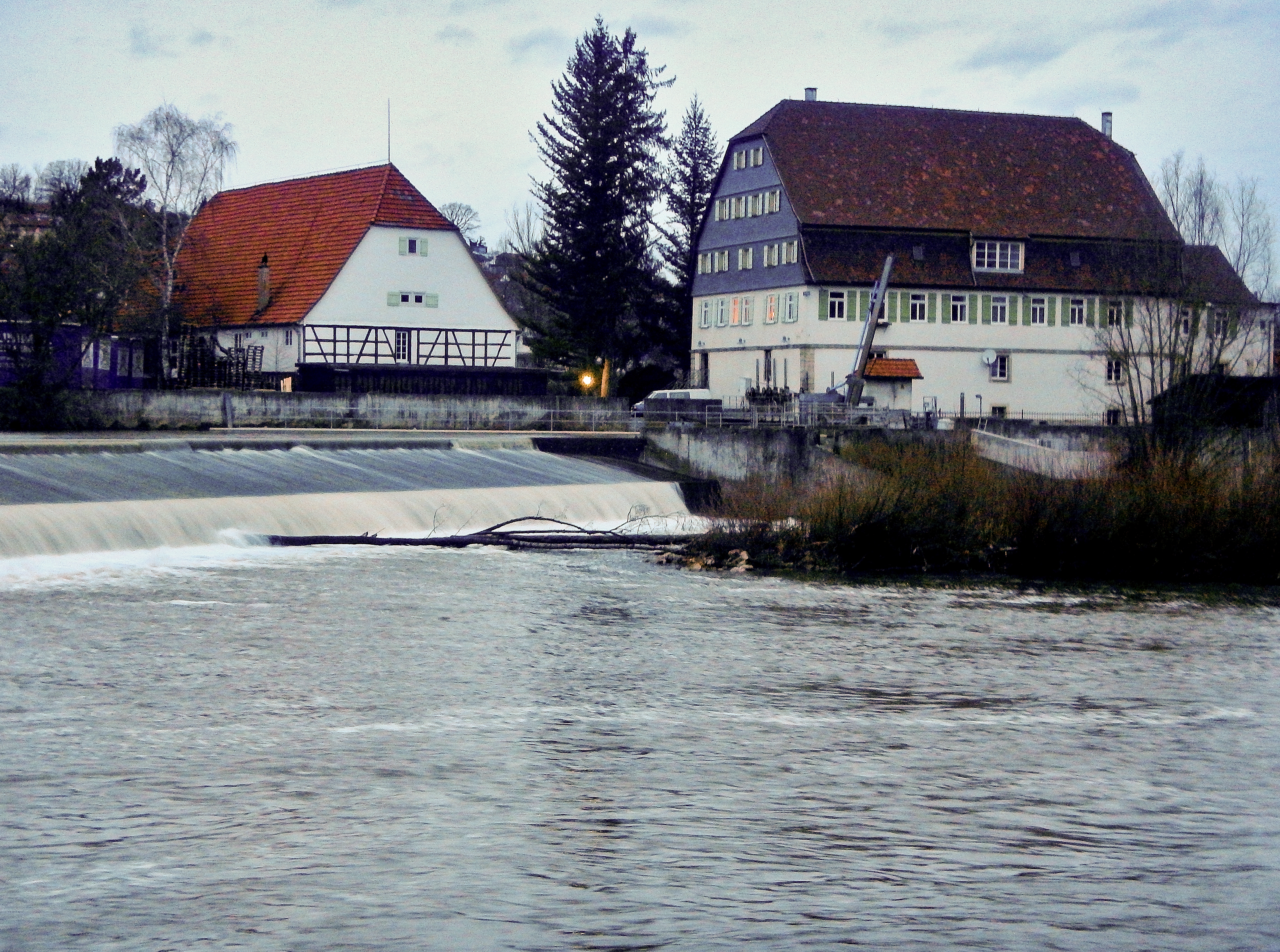 Beim 366 km langen Neckartalradweg: Die Hummelsche Mühle: Die Unterensinger Mühle wurde im 15. Jh. erstmals urkundlich erwähnt. Das Entstehungsdatum liegt vermutlich vor 1389. 1824 und 1853 fand ein Umbau statt. 1899 wurden die maschinellen Einbauten für 280.000 Mark ersetzt. Seit 1908 wird die Mühle mit elektrischer Energie aus dem Netz versorgt.